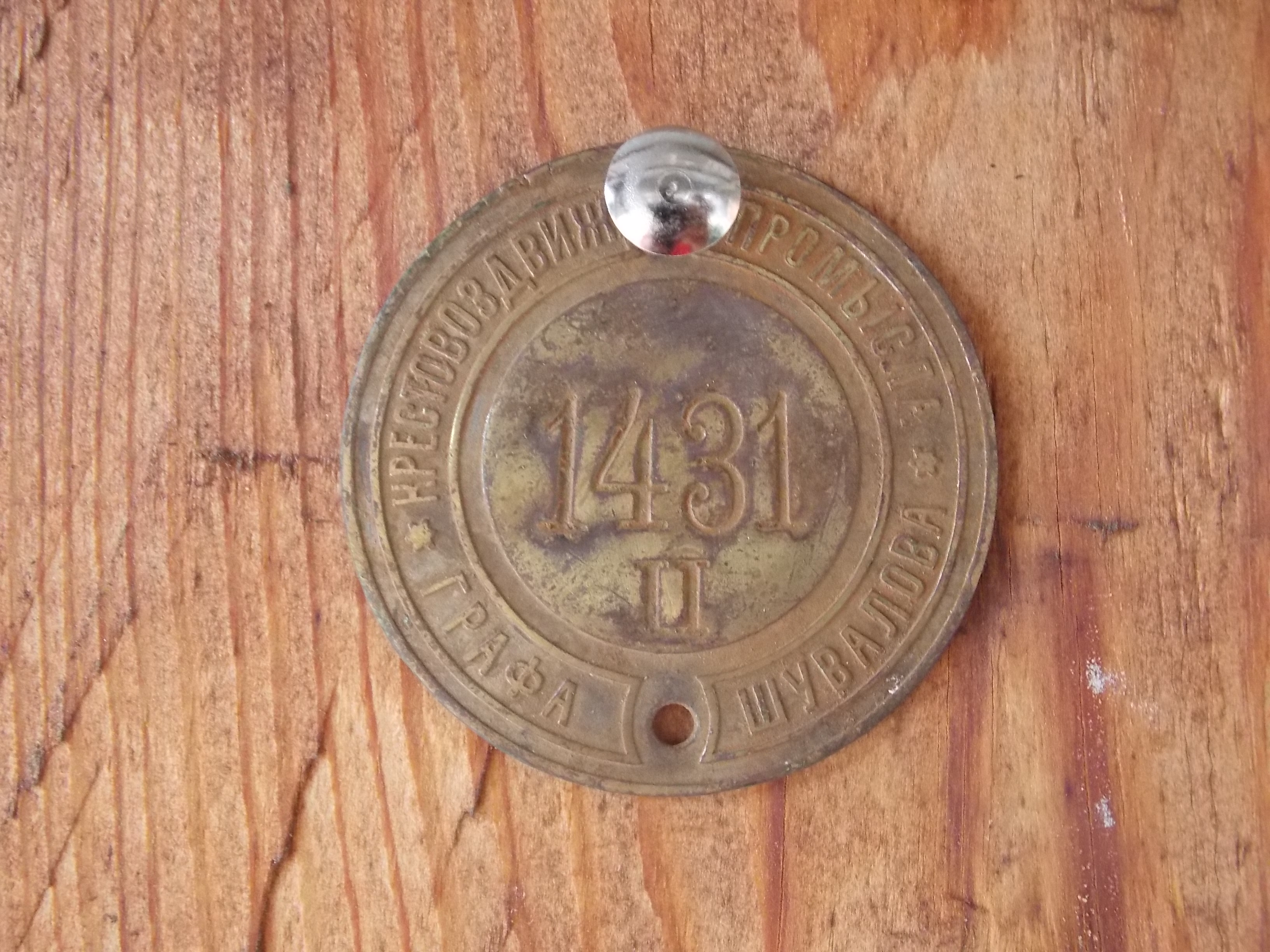 1889 год